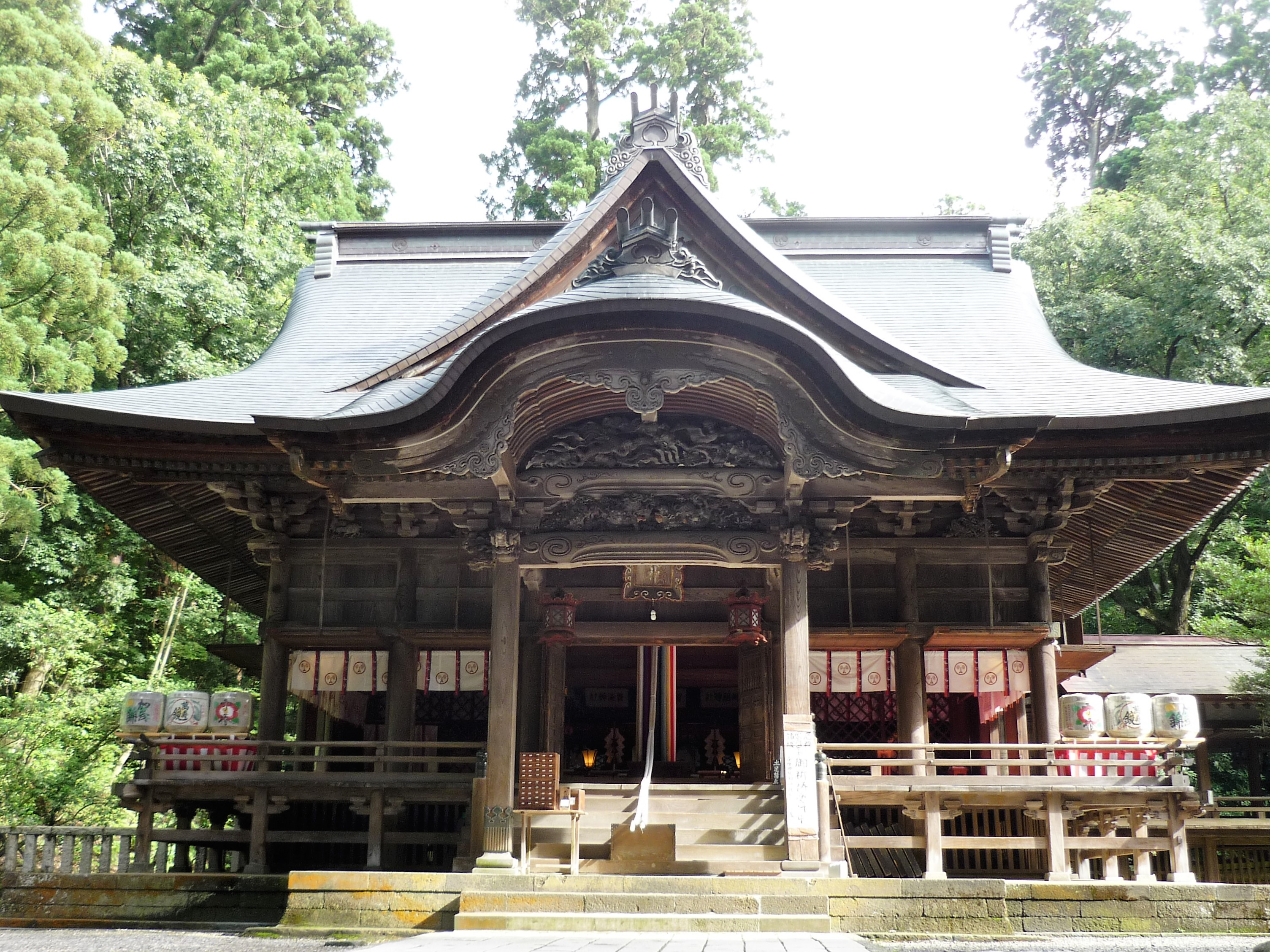 青海神社（新潟県加茂市大字加茂229）拝殿